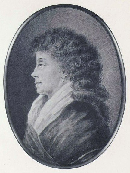 Юлиана Ивановна Пален, ур.фон Шеппинг (1753—1814), статс-дама, жена П.А.Пален.